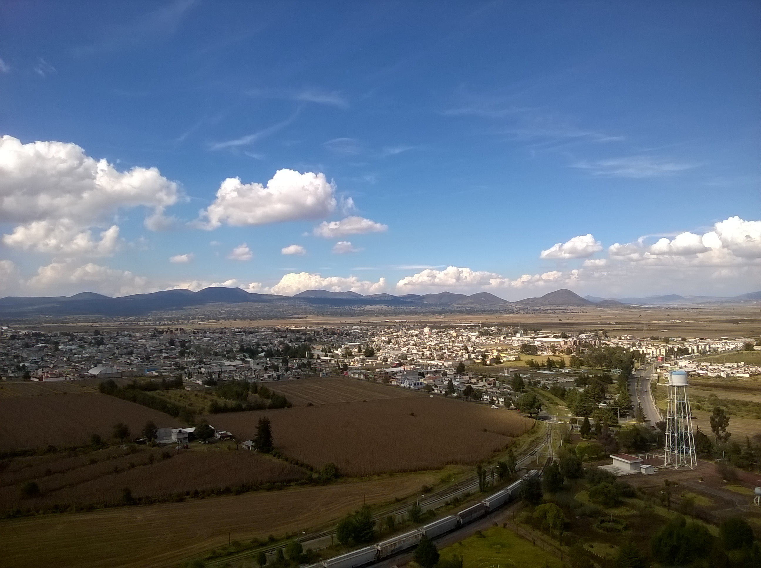 Vista aérea de Calpulalpan, Tlaxcala